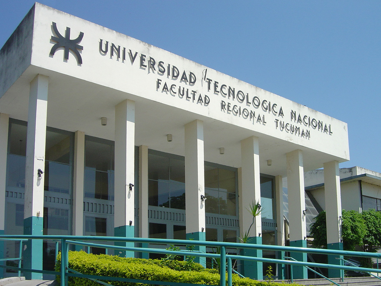 Universidad Tecnologica Nacional - Facultad Regional Tucumán - Argentina